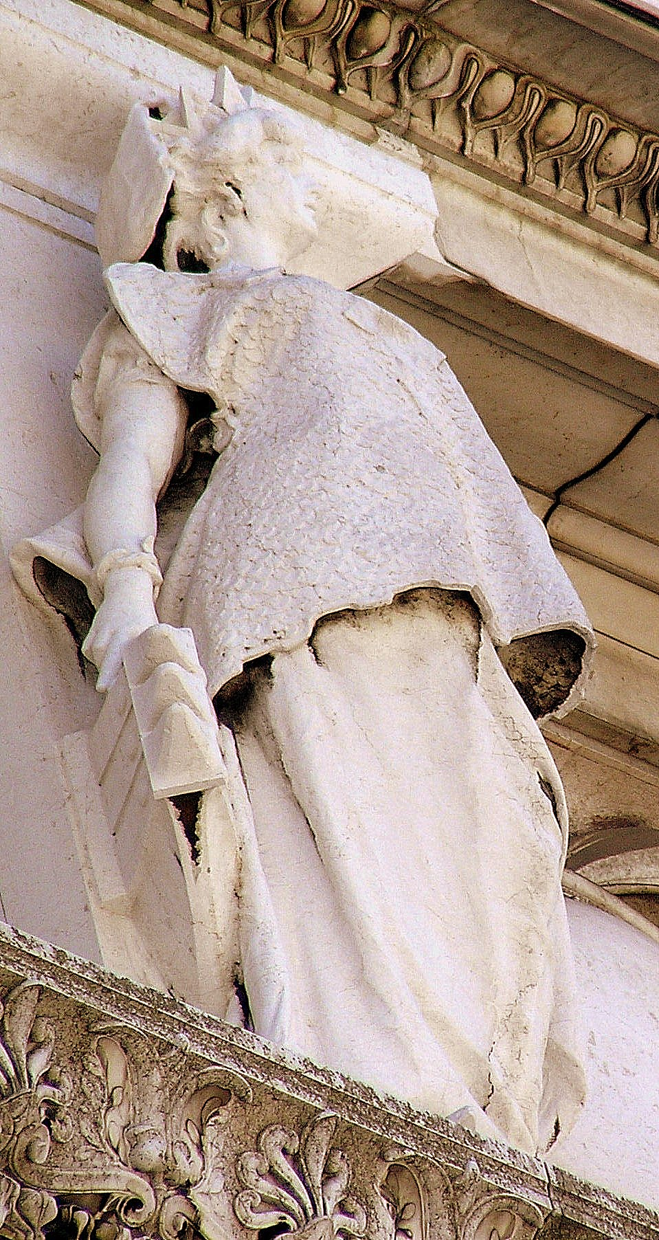 Vittoriano - statue delle regioni - Liguria